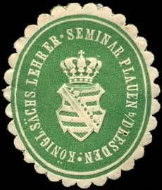 Sealing stamp Title: Königlich Sächsisches Lehrer-Seminar Plauen bei Dresden Description: grün, weiß, geprägt Place: Plauen size: 4x3 cm